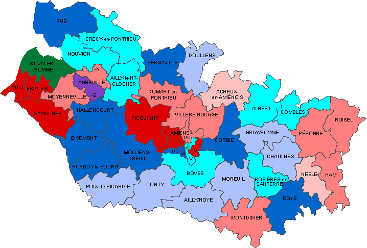 Conseil général en 2003